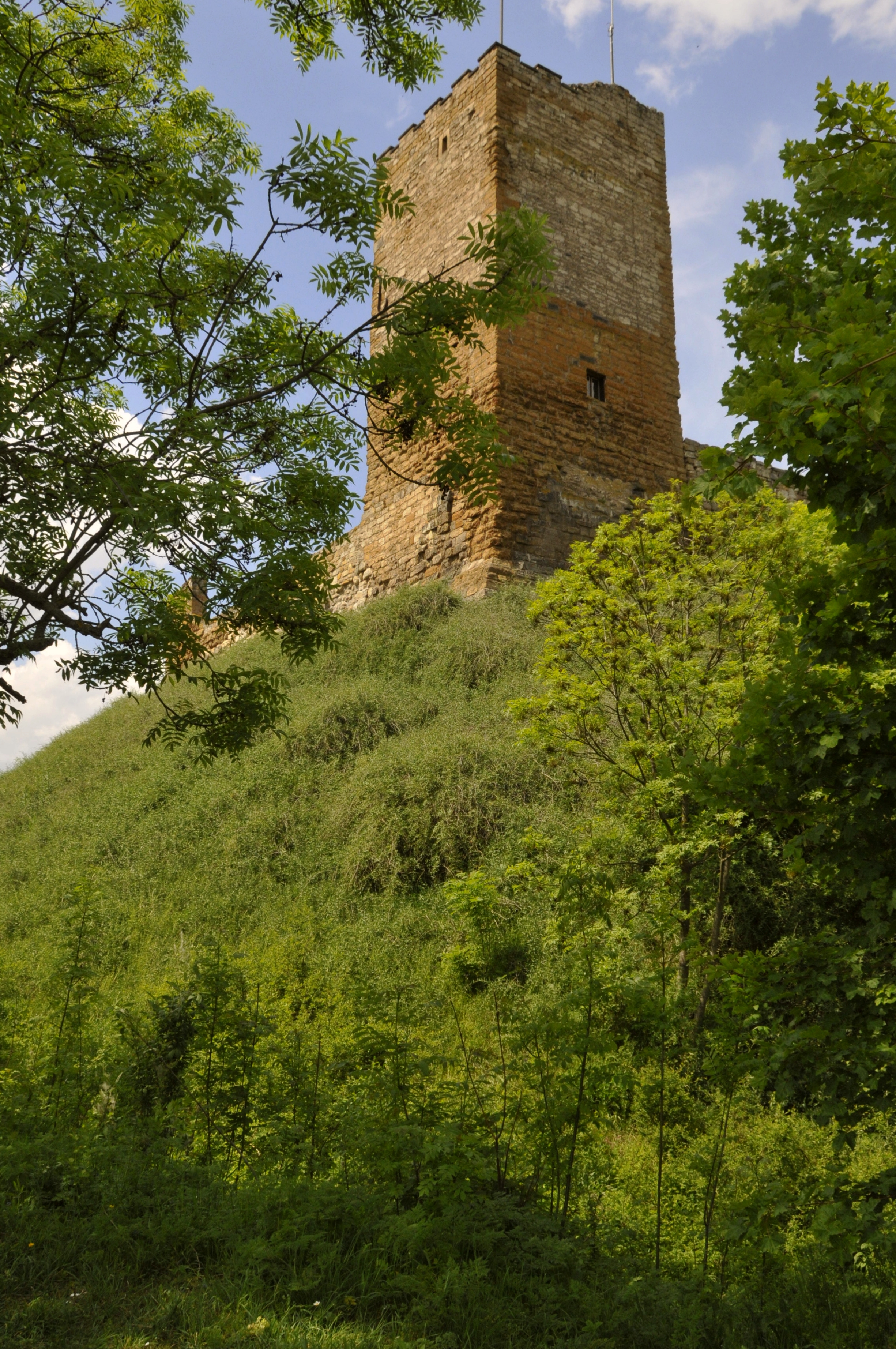 Bergfried der Burg Gleichen von Südwest